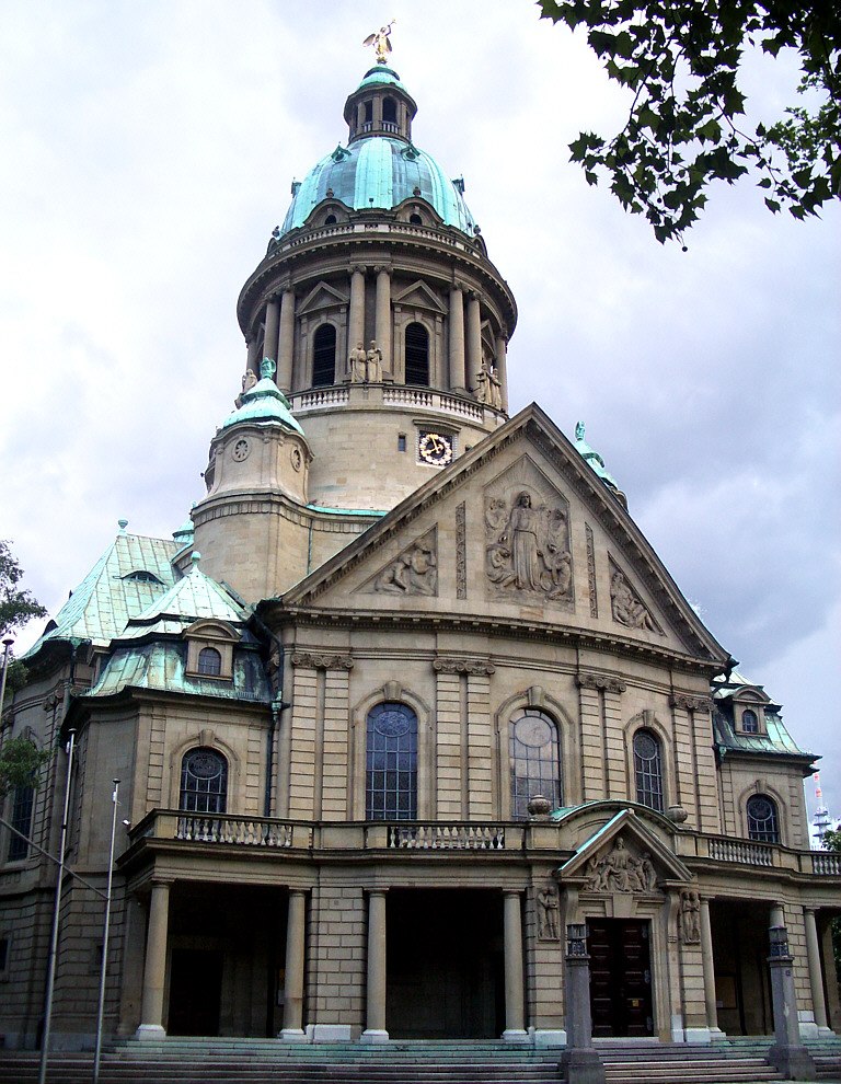 Mannheim, Germany: Christuskirche